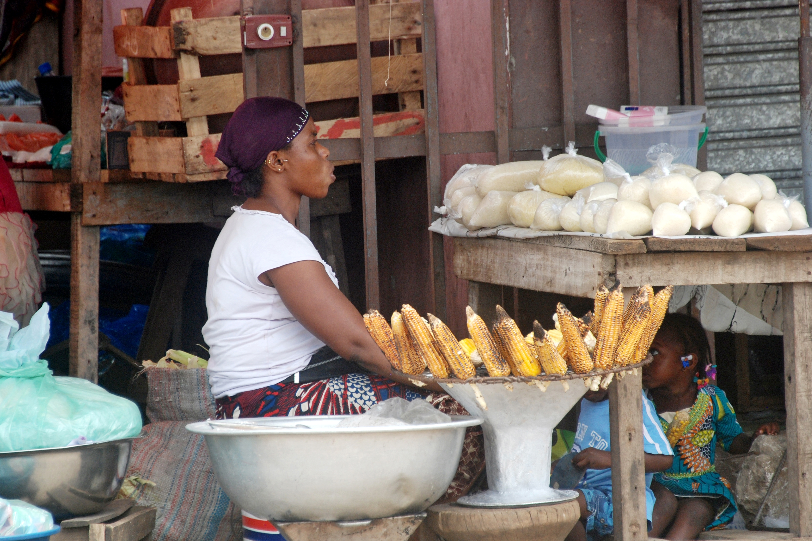 vendeuse de maïs braisé à Grand-Bassam This is an image of "African people at work" from Ivory Coast